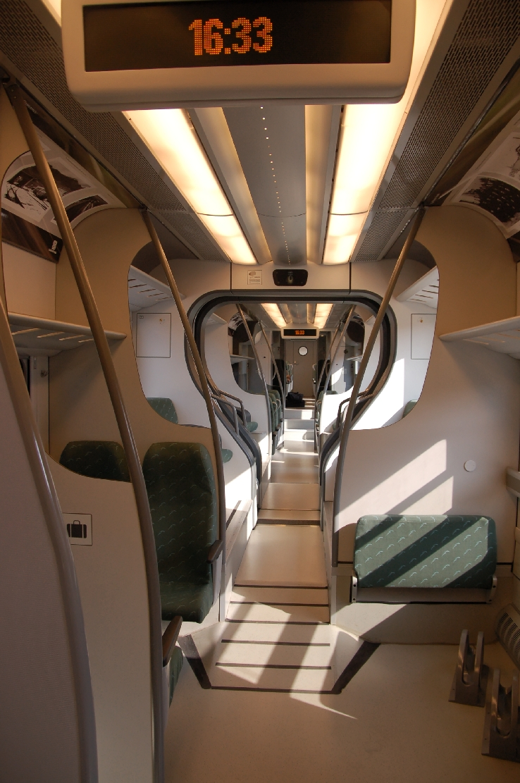 Ferrovia Adriatico Sangritana 2011 in Vasto